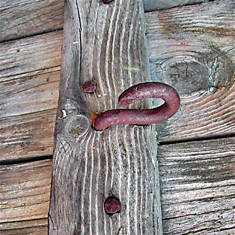 Trillo español, gancho para la tracción